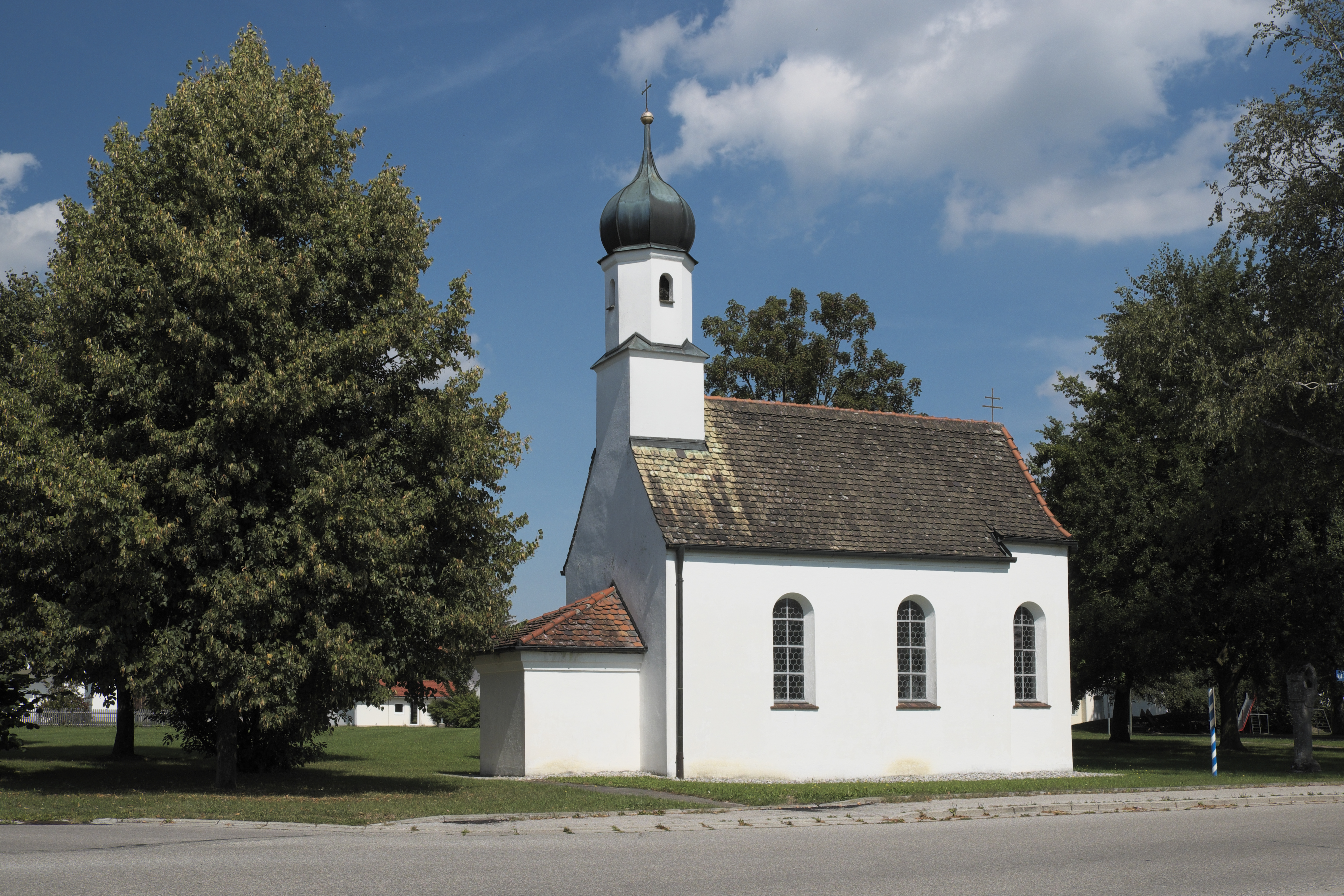 Kapelle St. Sebastian in Eching am Ammersee im Landkreis Landsberg am Lech (Bayern/Deutschland)